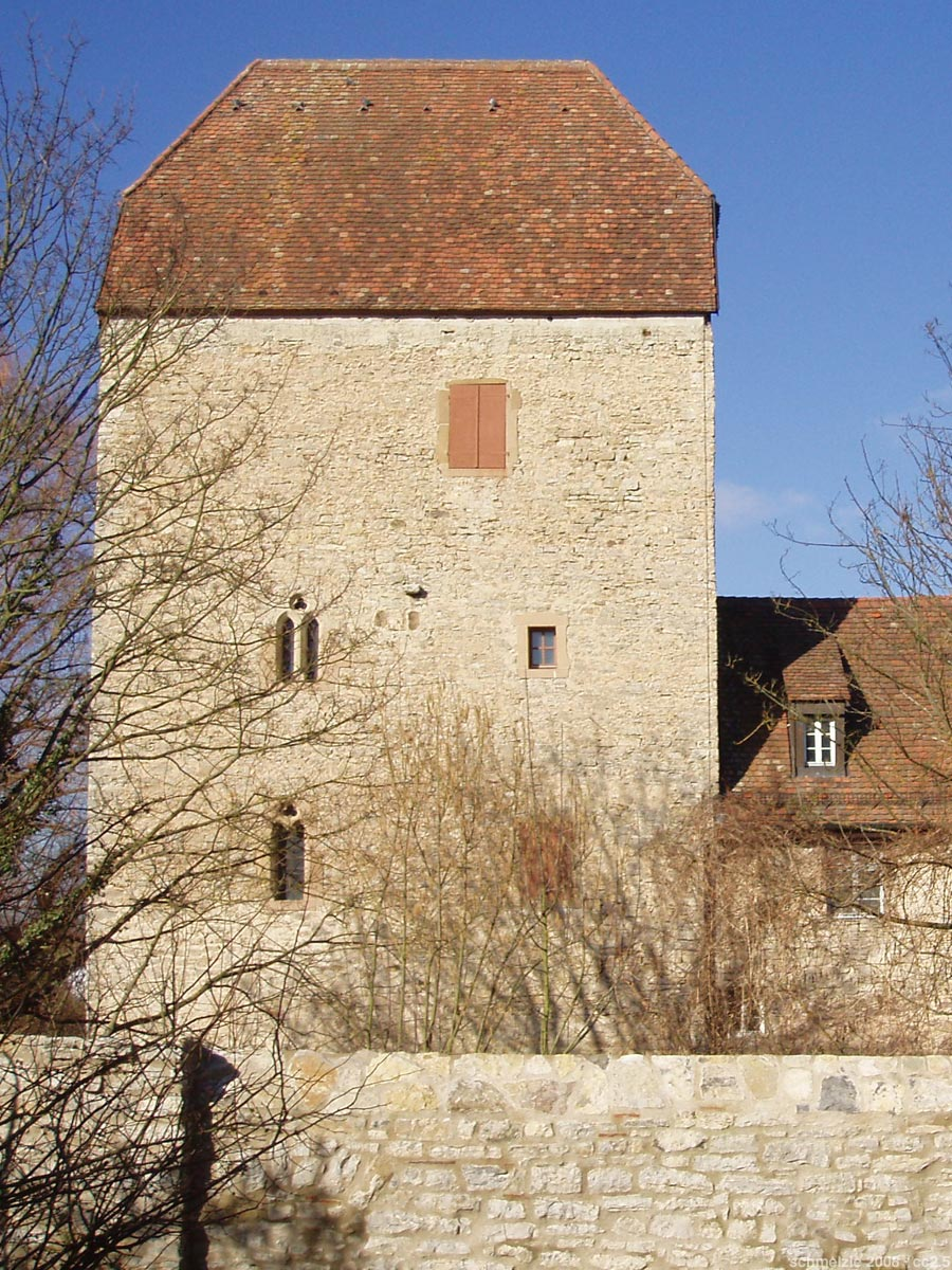 Burg Horkheim, Steinhaus von Südosten, von der Kirche aus gesehen